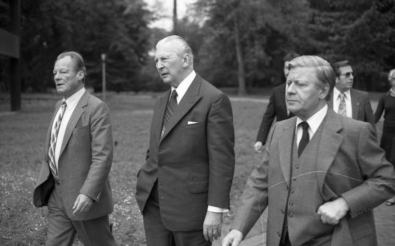 Pflanzung von Kanzler-Gedächtnisbäumen im Park des Palais Schaumburg durch Bundeskanzler Helmut Schmidt und seine Vorgänger Willy Brandt und Kurt-Georg Kiesinger